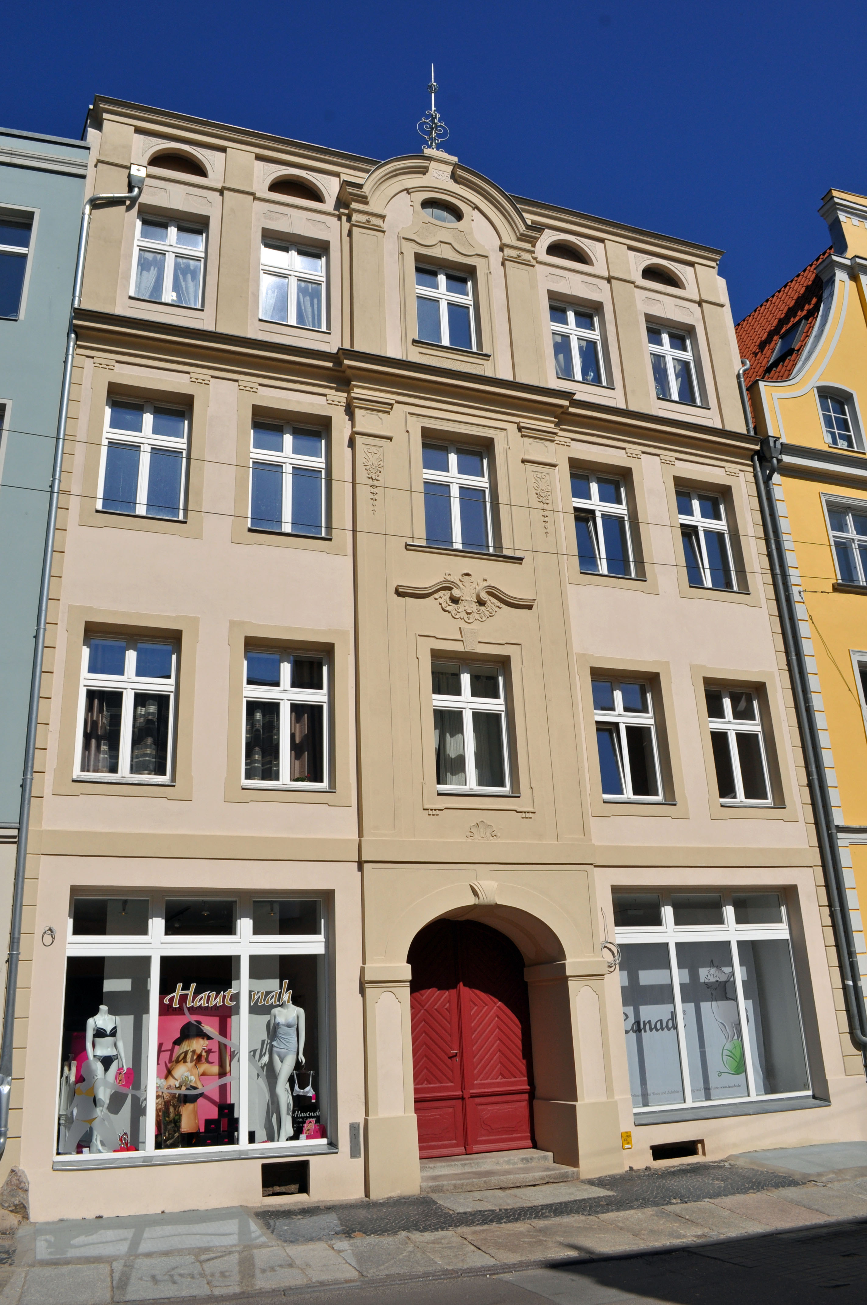 Gebäude bzw. Gebäudedetail in Stralsund. Straße und Hausnummer siehe Dateiname.